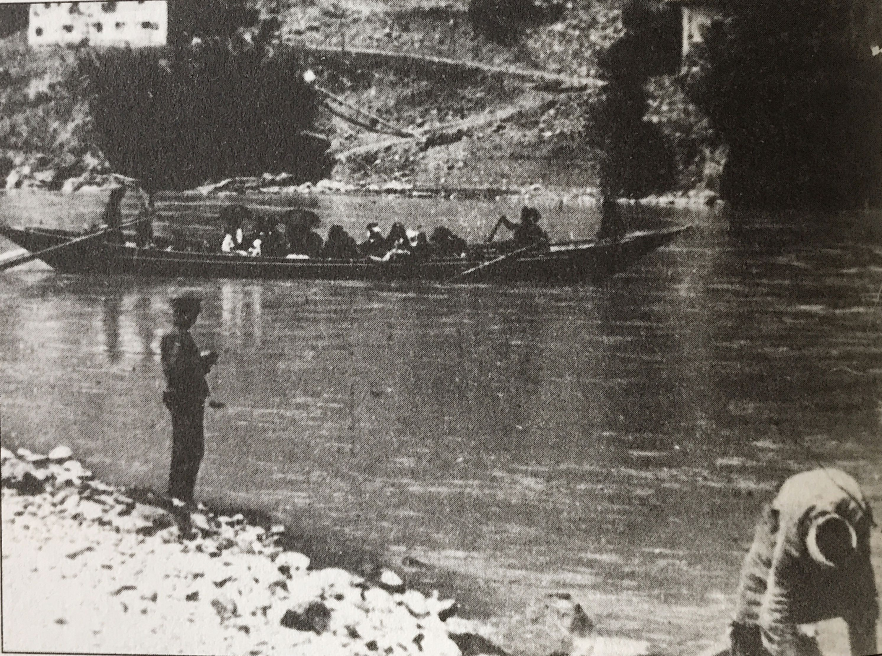 Borçka köyünde yolcu kayığı